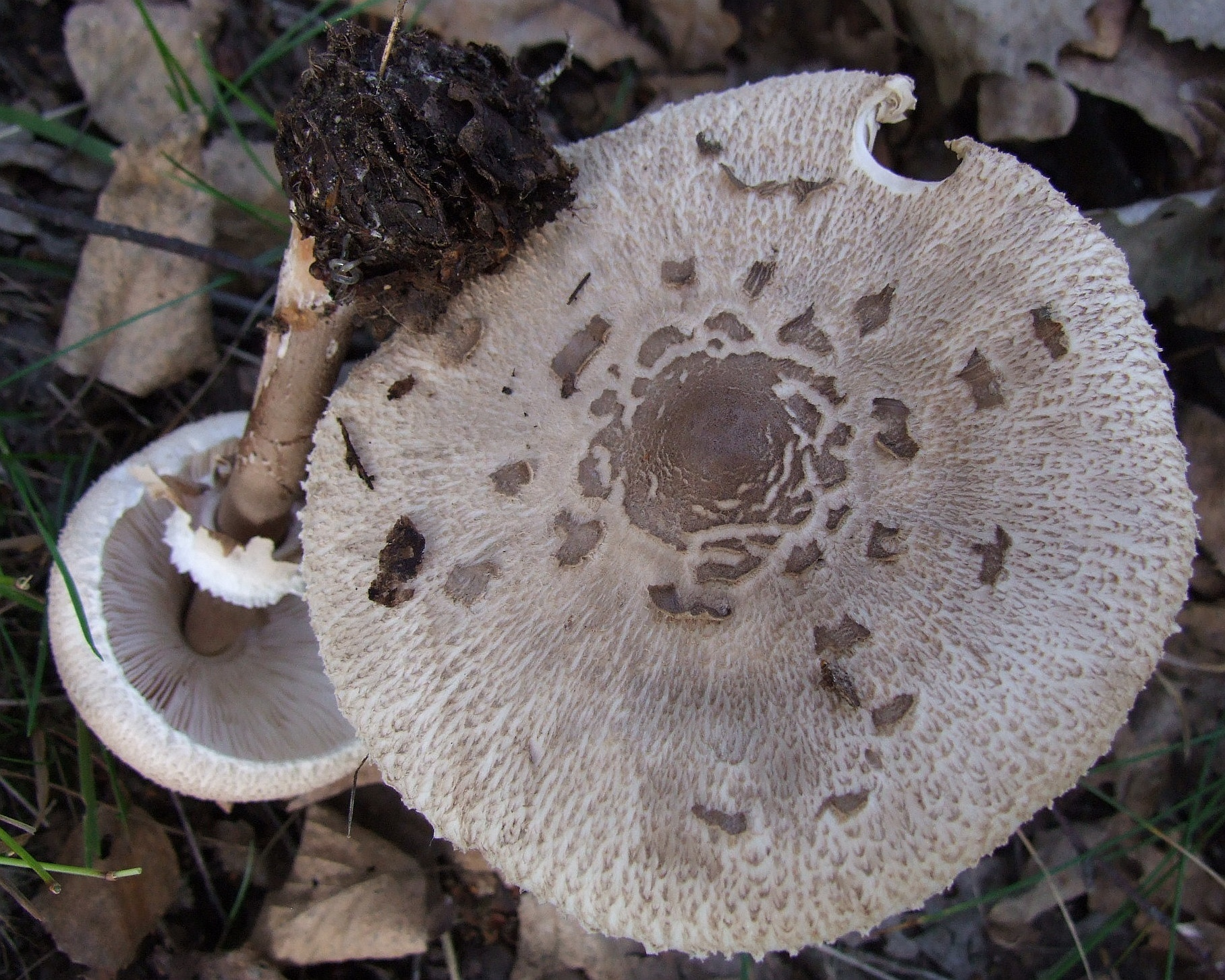 Macrolepiota konradii (habitat:Pieniny)